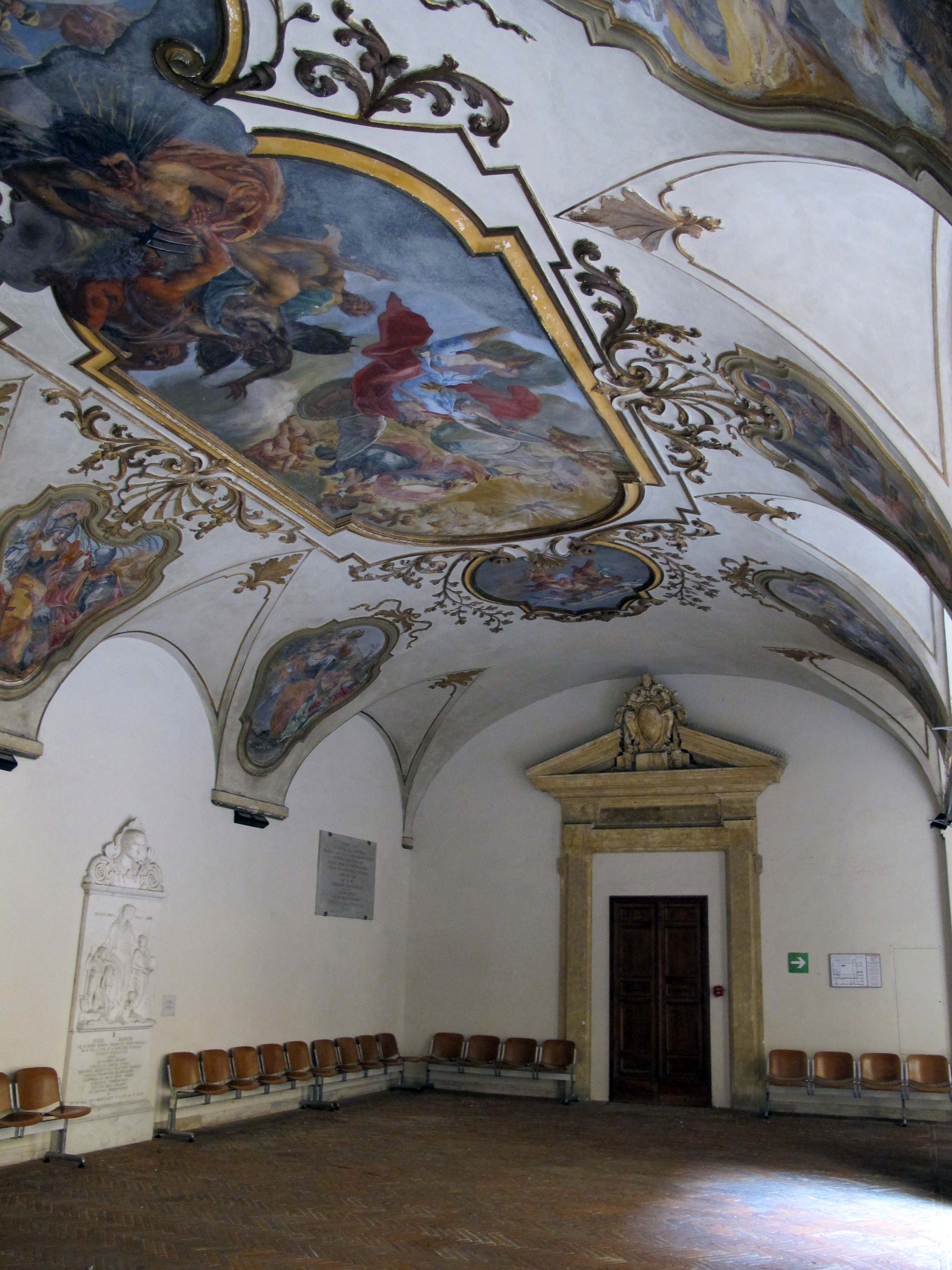 Banchi di Sotto, Siena